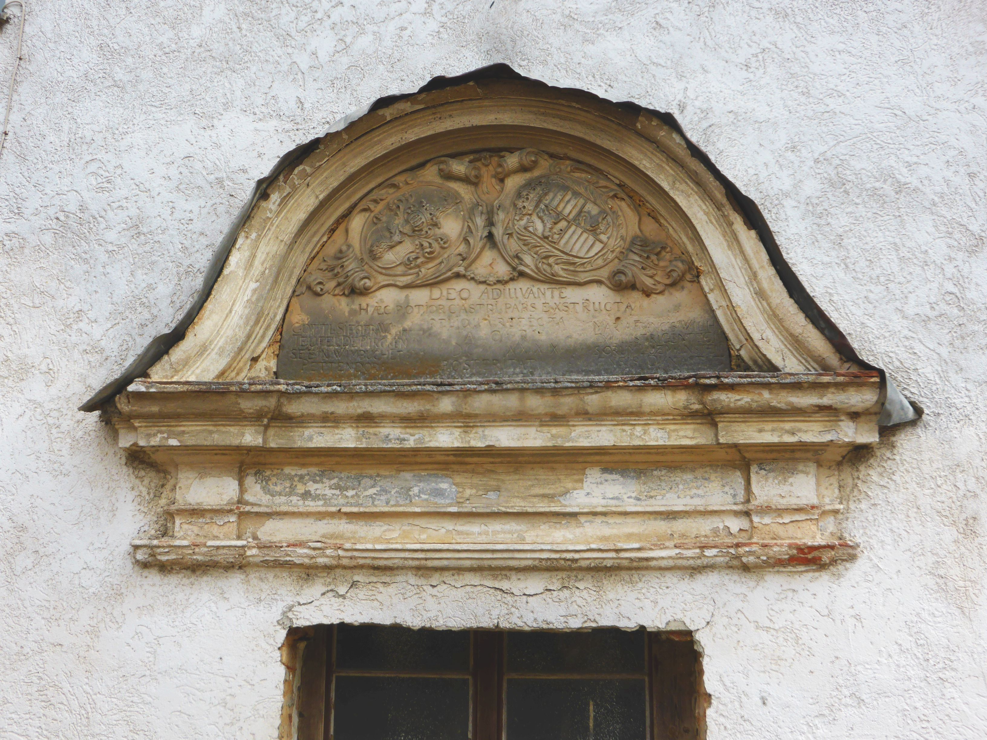 Eingangsportal Schloss Winbuch (Schmidmühlen) Inschrift Mitte: DEO ADIUVANTE HAEC POTIOR CASTRI PARS EXSTRVCTA RELIQVA REFECTA A. O. R. MDLCXXXIX (= 1739) POST ERITATI SIVE GRATAE SIVE INGRATAE: Links unten: GOTTL: SIEGFR: WILH: TEUFEL DE PIRCKENSEE IN WIMBUCH ET PETTENDORF: Rechts unten: MARIA FRANC. WILH: EX ILLUSTRI GENTE GISIORUM LUZMANSTEINEIVSIS DYNASTIAE ORIUNDA.